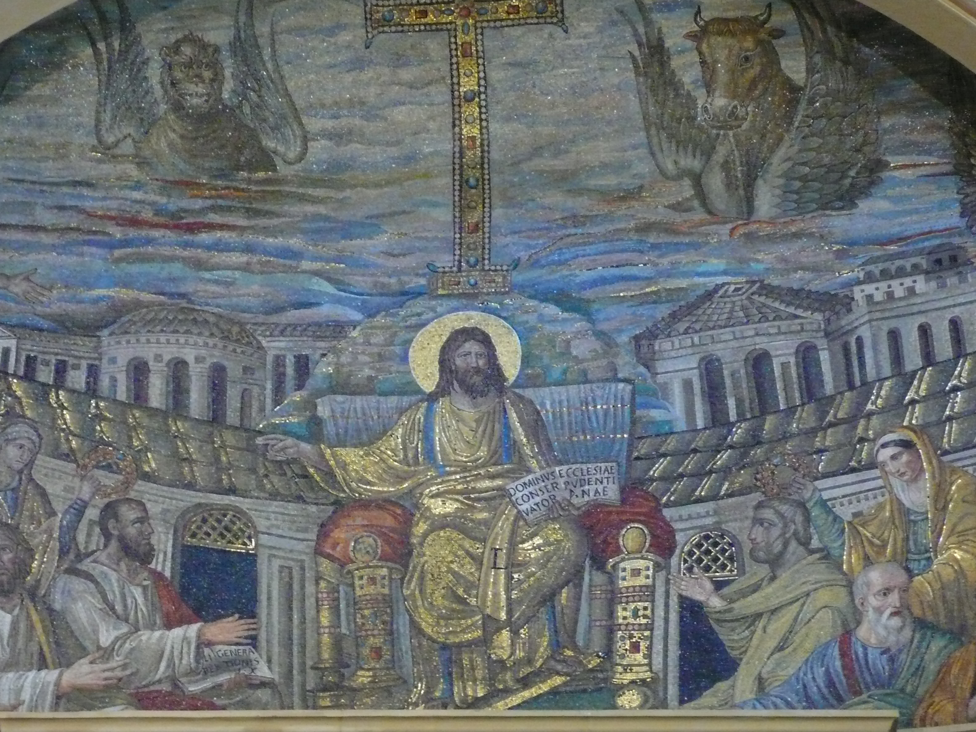 Apsis mosaic of Santa Pudenziana, Rome; detail; c. 410 AD.